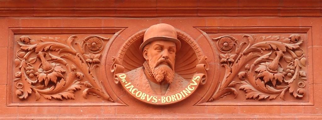 Relief des Mediziners Jacob Bording (1511-1560) an der Fassade der Universität Rostock